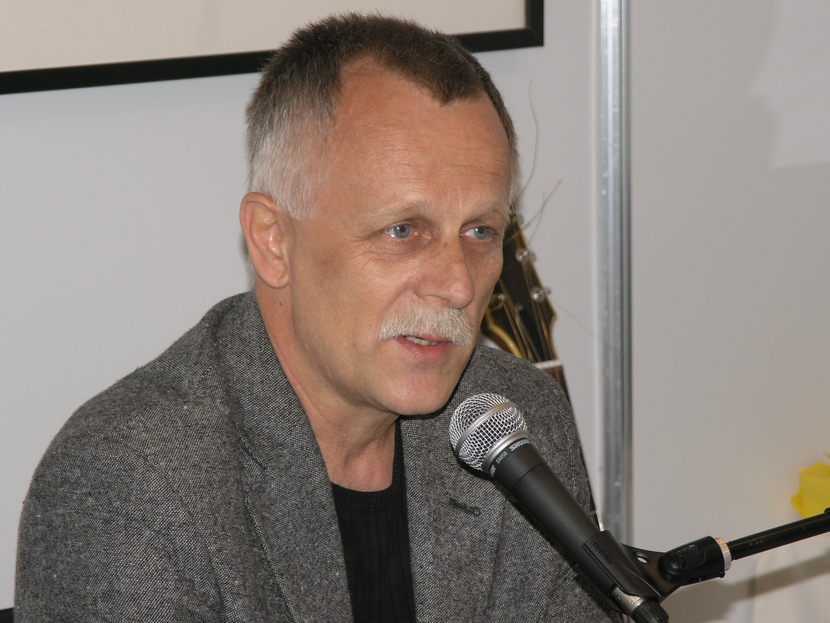 Praha, Svět knihy 2009 - Jiří Dědeček